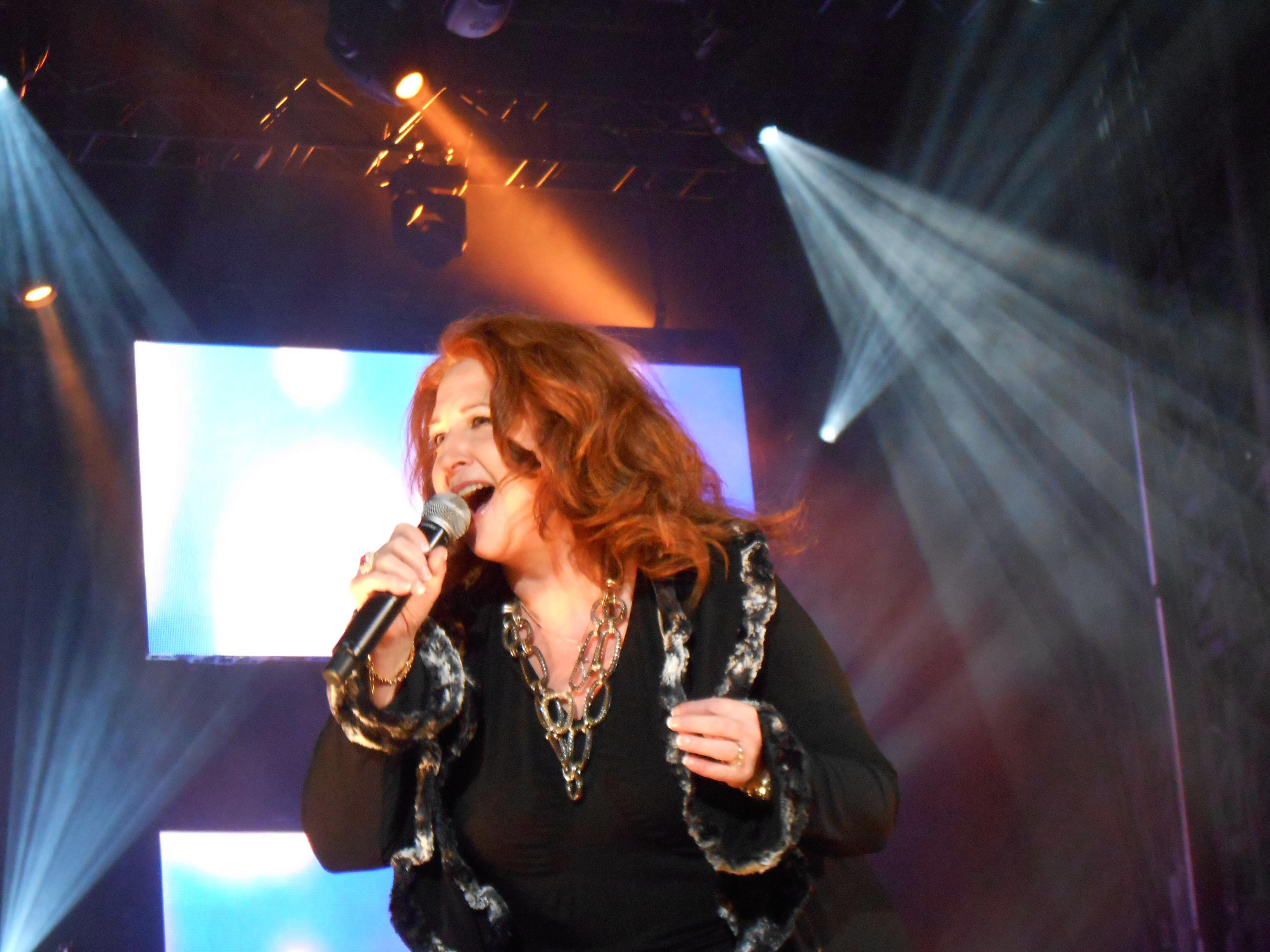 Pour célébrer les 25 ans des FrancoFolies de Montréal, le président, Alain Simard, a eu l'idée de réunir 25 artistes (ou groupes) qui chanteraient chacun LA chanson de leur répertoire la plus connue du public. Le spectacle a eu lieu lundi le 17 juin 2013 à partir de 21:00 à la place des Festivals. Dans l'ordre, sont apparus : Karim Ouellet, Ariane Moffatt, Richard Séguin, Corneille, Lisa LeBlanc, Daniel Lavoie, Mara Tremblay, Mes Aïeux, Luc De Larochelière, Dumas, Isabelle Boulay, Yann Perreault, Laurence Jalbert, Stefie Shock, Michel Rivard, Pierre Lapointe, Dan Bigras, Paul Piché, Vincent Vallières, Les Respectables, Damien Robitaille, Loco Locass, Daniel Boucher, Marjo et Éric Lapointe.